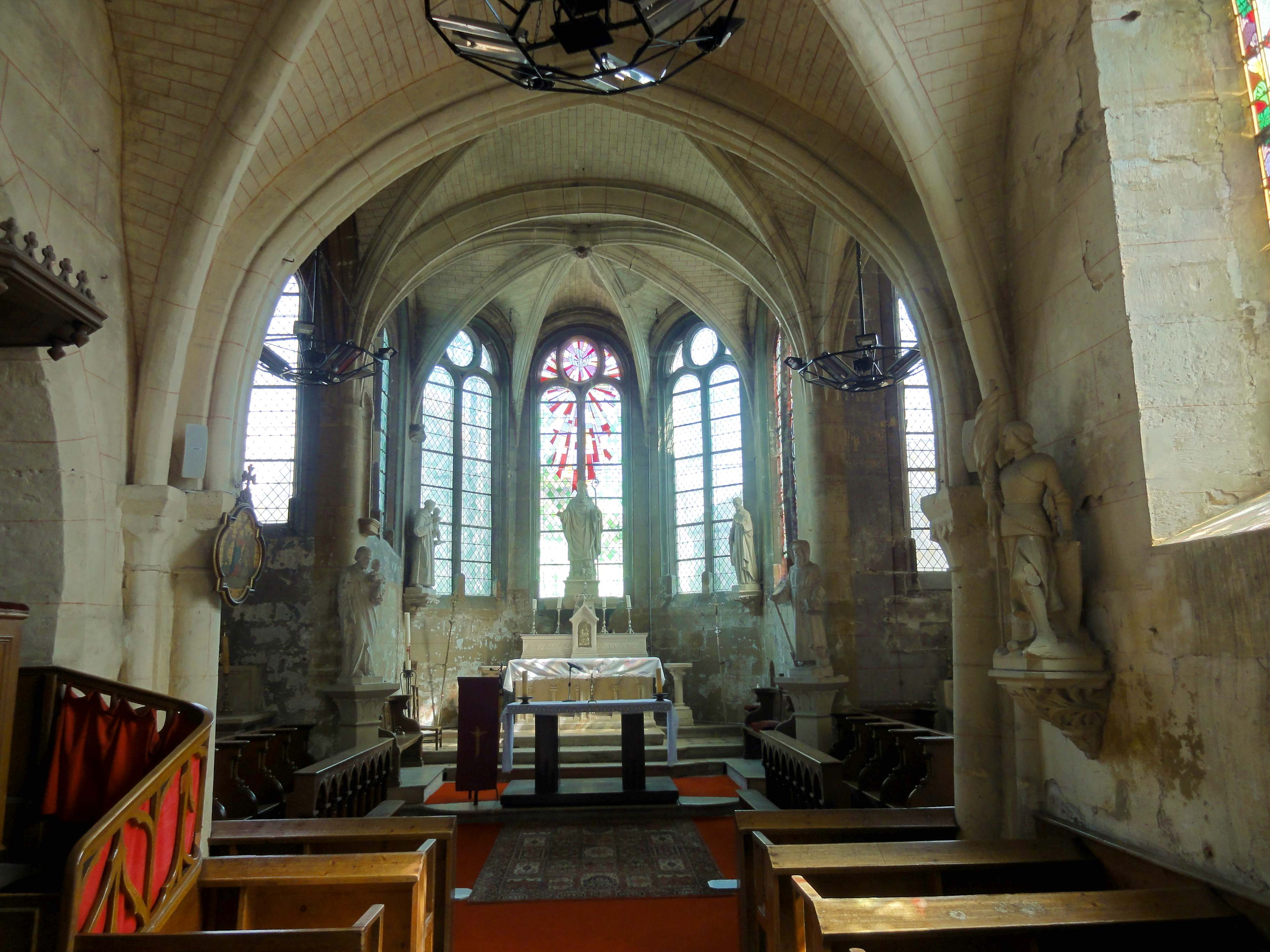 Intérieur de l'église (voir titre).